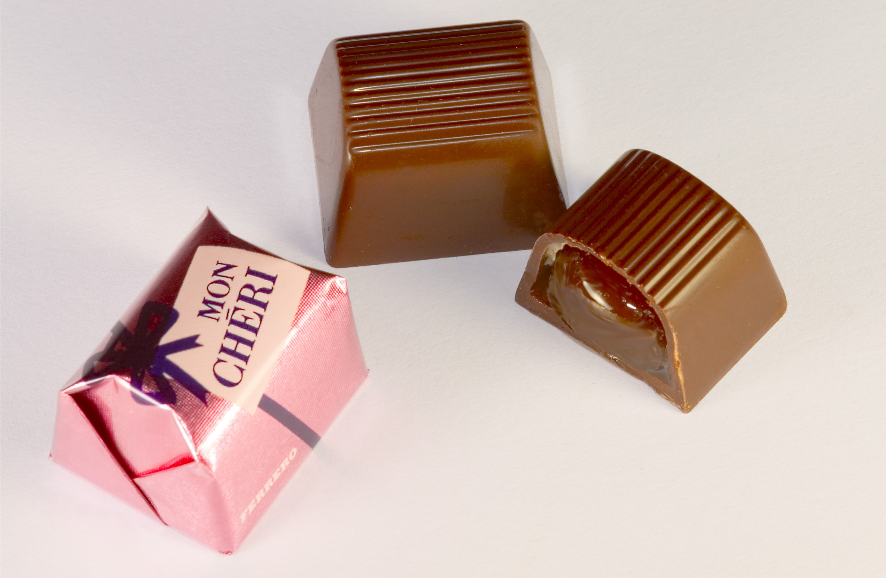 Mon Cheri von Ferrero